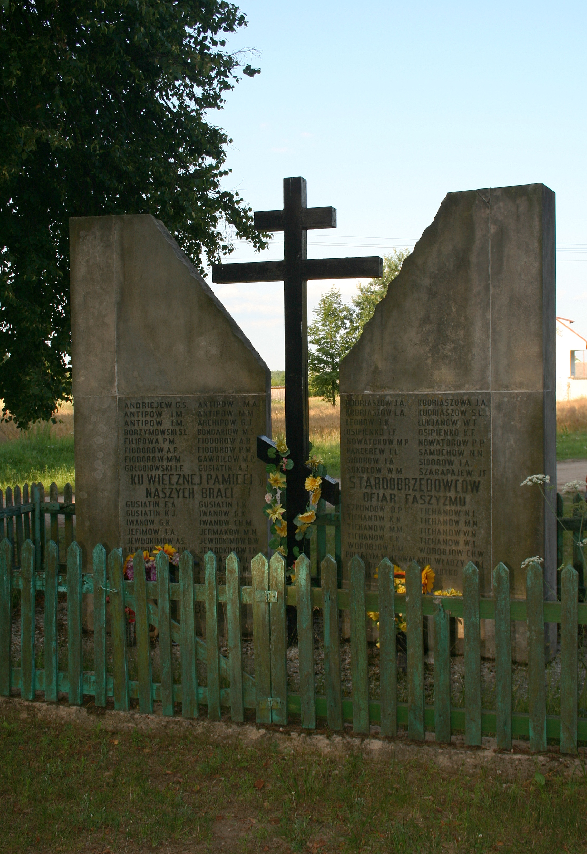 pomnik w Gabowych Grądach, woj. podlaskie